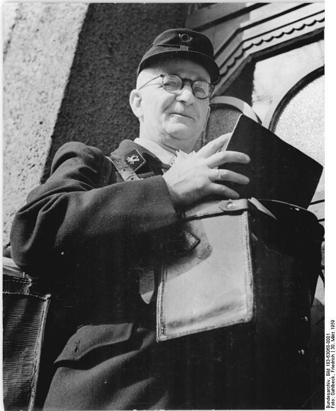 Zentralbild Gahlbeck 30.3.1959 Ein weiterer Schritt zur Lösung der ökonomischen Hauptaufgabe Ministerrat beschloß Lohn- und Gehaltserhöhungen für 275.000 Arbeiter und Angestellte- Wie das Presseamt beim Ministerpräsidenten am 28.3.1959 mitteilt, hat das Präsidium des Ministerrates am 26.März 1959 Lohn- und Gehaltserhöhungen für eine weitere große Zahl von Arbeitern und Angestellten beschlossen. Die neuen Maßnahmen bringen für den größten Teil der Beschäftigten der Lebensmittelindustrie und der Deutschen Post, für die Beschäftigten in den Betrieben der zellastoff-, Papier und Pappeerzeugung, der Reifenkord- und Kunstlederherstellung sowie für die Mitarbeiter des Staatlichen Gesundheits- und Veterinärwesen mit Hochschulbildung und für weitere Beschäftigungsgruppen im staatlichen Gesundheitswesen eien beträchtliche Verbesserung ihrer Lebenslage. Das Realeinkommen von 275.000 Beschäftigten in den genannten Bereichen erhöht sich um jährlich 108 Millionen DM. Für ca. 75 00 beschäftigte der unteren Einkommnesgruppen der deutschen Post, tritt die neue Lohn- und Gehaltserhöhung bereits am 1. April 1959 in Kraft.Mit Kollegen eines Postamtes in Erfurt sprach unser Bildreporter.(Näheres zur Lohn- und Gehaltserhöhung siehe ADN-Meldung vom 28.3.1959) UBz: Der Angestellte der Deutschen Post Rudolf Hülle, Austräger beim Hauptpostamt in Erfurt meinte zur Lohnerhöhung: "Ich wollte mir in diesem Jahr einege Anschaffungen in meiner Wohnung leisten. Da muß man natürlich sparen, Jetzt, nach der Lohnerhöhung fällt mir dieses Vorhaben viel leichter. Dafür kann ich der Regierung nur meinen Dank sagen.